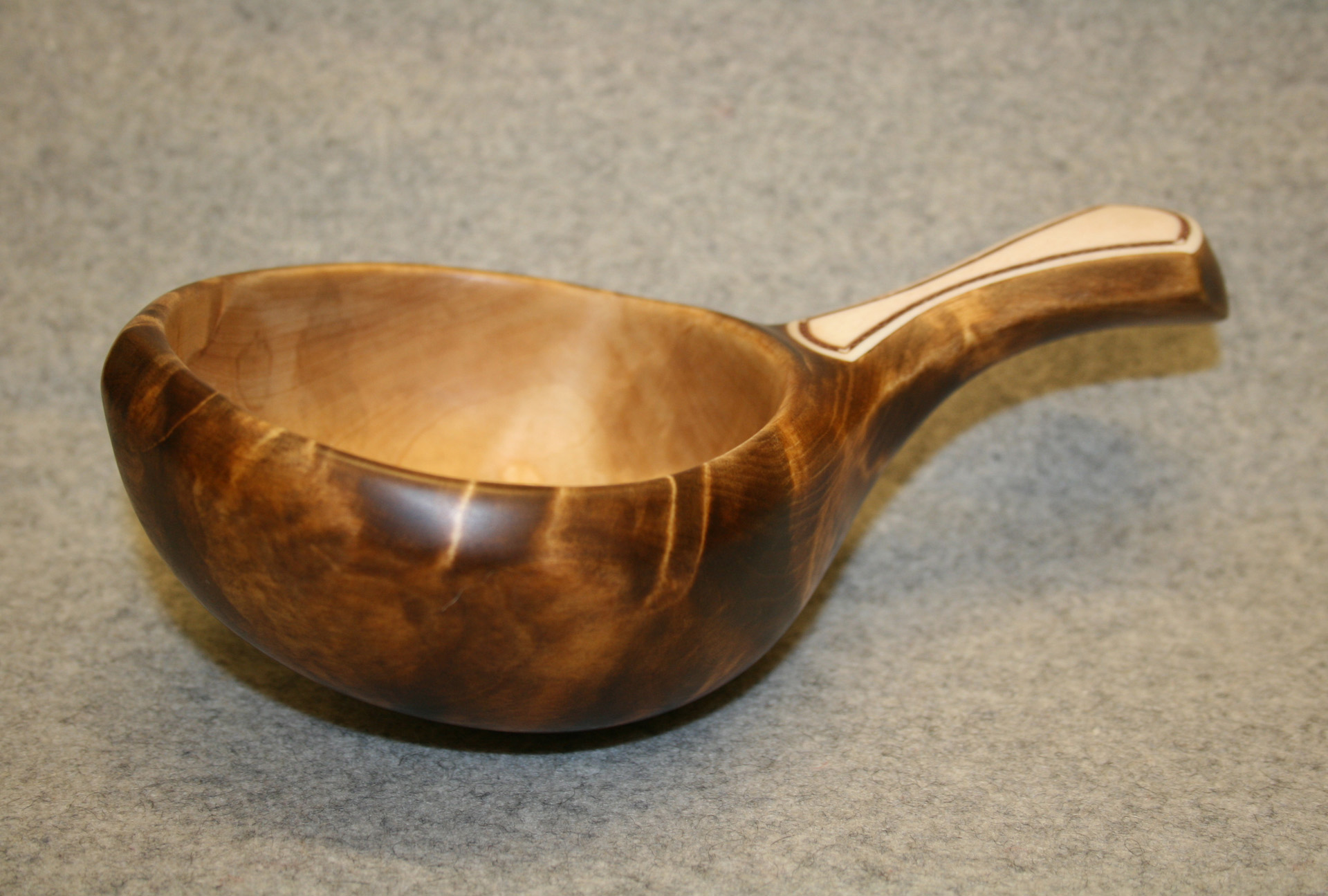 Davvisámegiella: Guksi